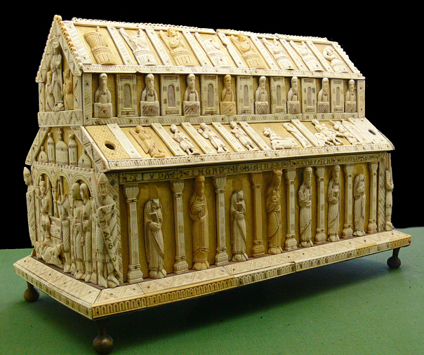 Reliquienschrein in Form einer Basilika mit Szenen aus dem Leben Christi Köln, 1. Hälfte 13. Jh. Württembergisches Landesmuseum Stuttgart, KK 125